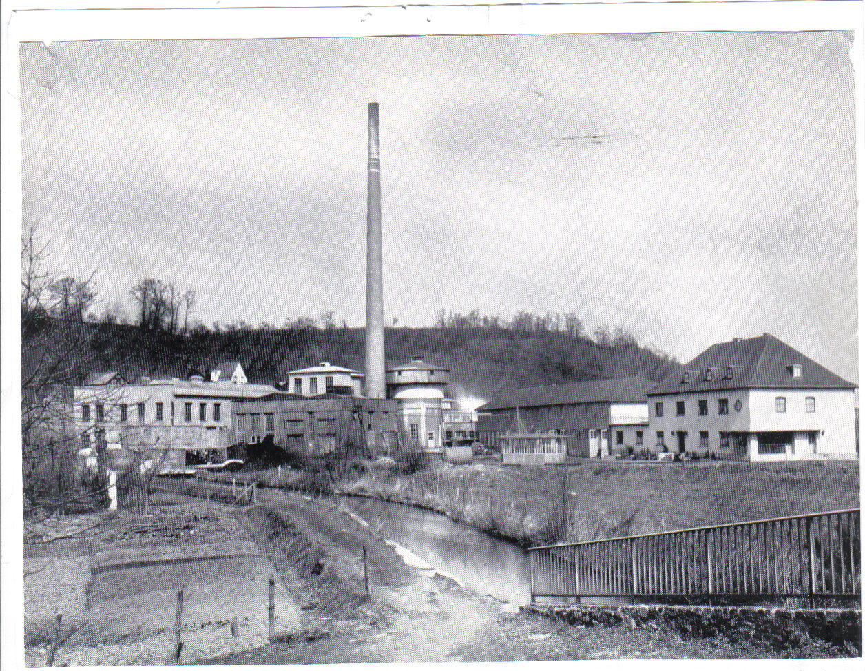 Papierfabrik Kayser von der Maubacher Straße aus.